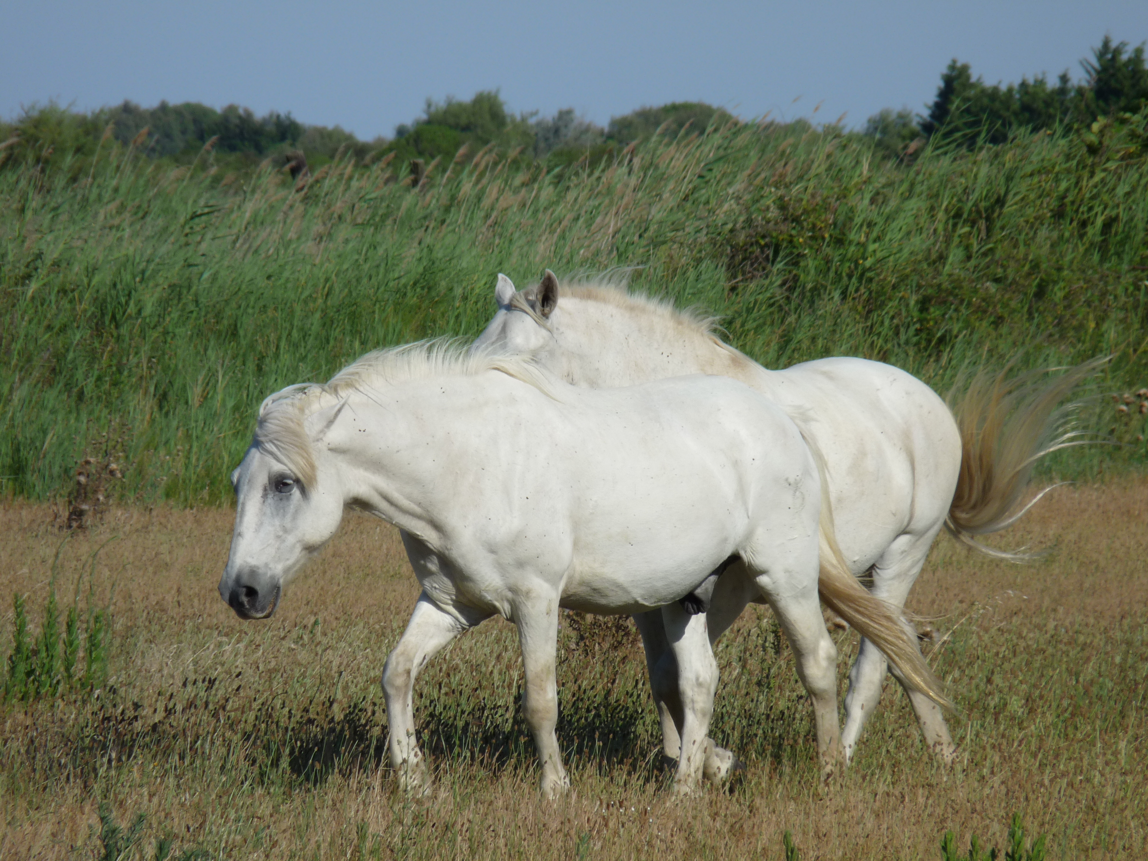 Saintes Maries de la Mer